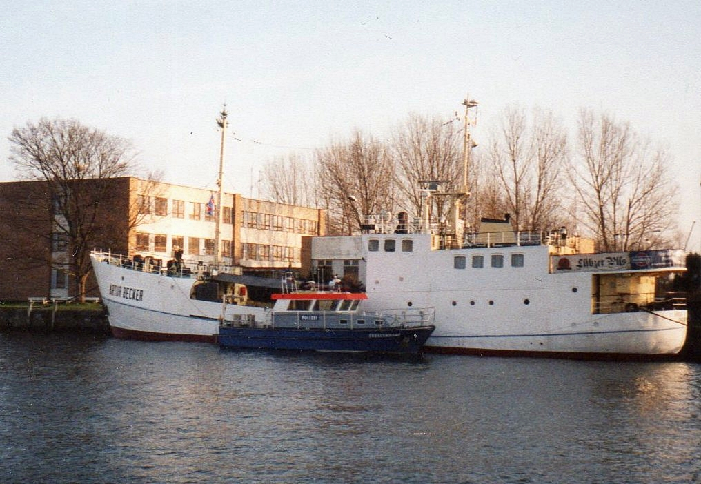 Sporttaucherschiff MS "Artur Becker" der ehemaligen GST-Marineschule "August Lütgens" Greifswald-Wieck